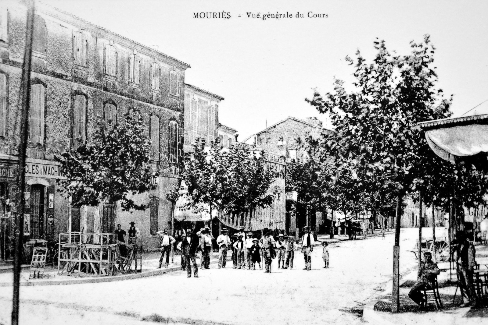 Mouriès im Jahr 1900, le Cours